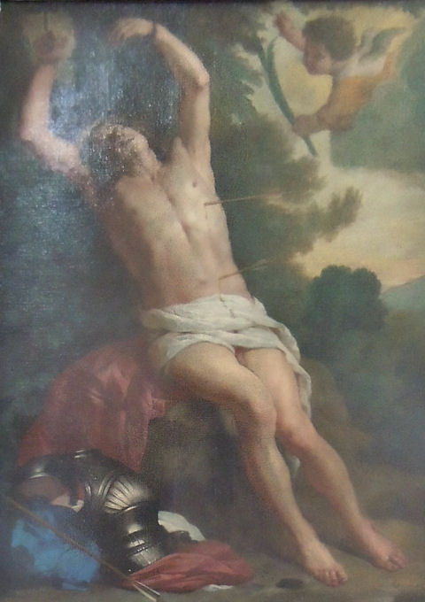 Interieur Kerk Haasdonck, St Jacob De Craeyer, St Sebastiaan